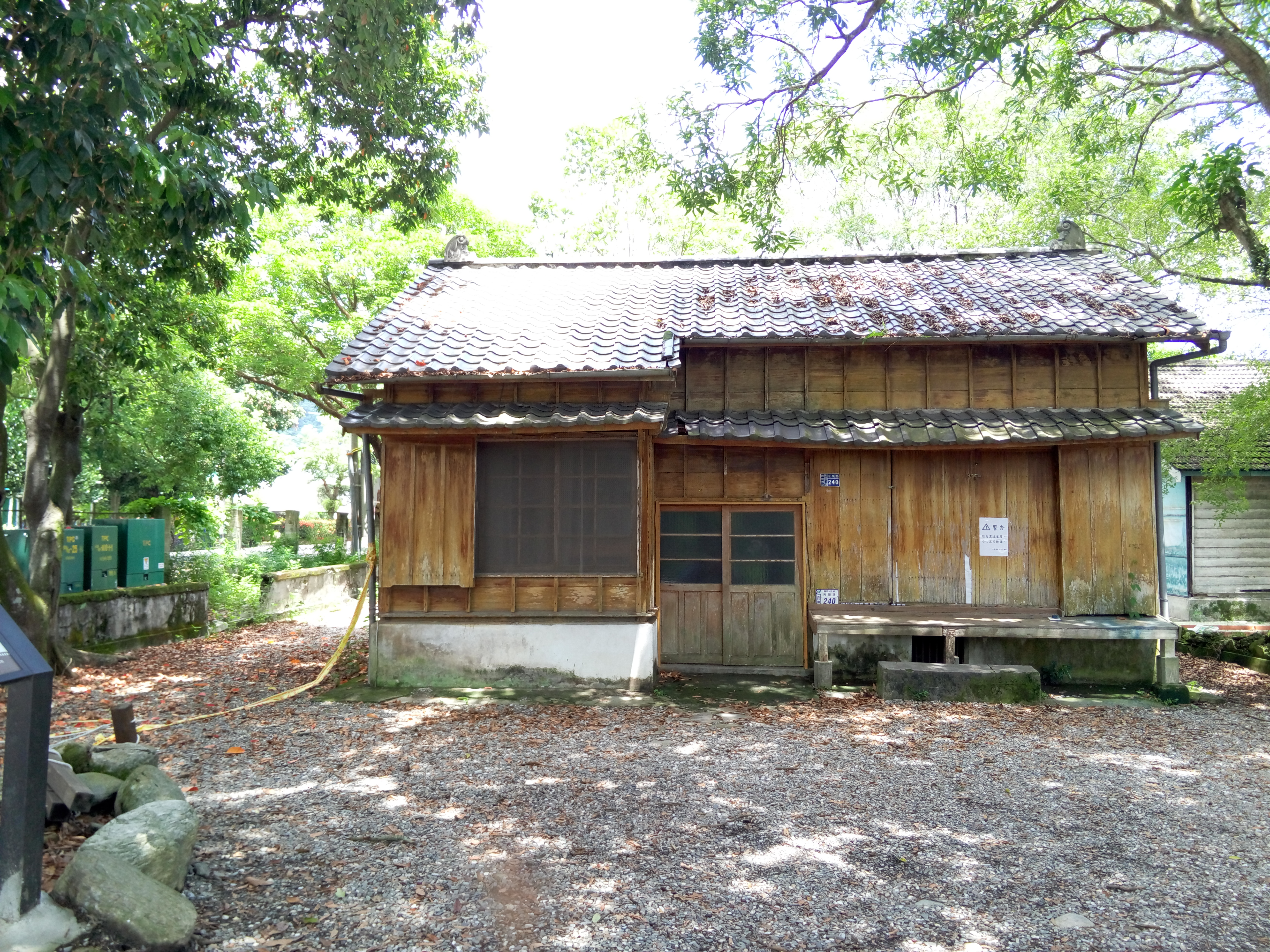 臺灣臺東縣鹿野鄉龍田國小日式托兒所